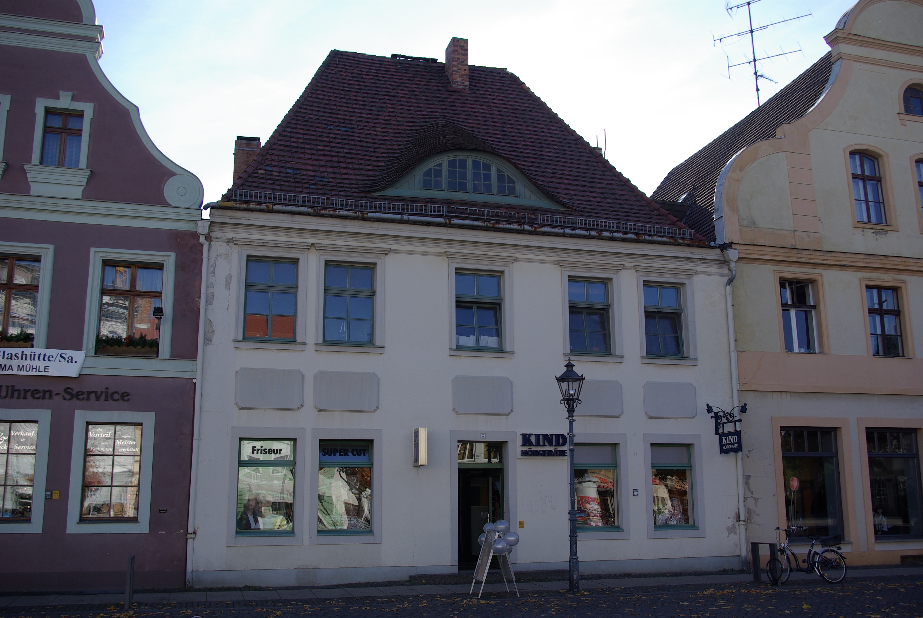 Cottbus in Brandenburg. Das Haus Altmarkt 26 steht unter Denkmalschutz.